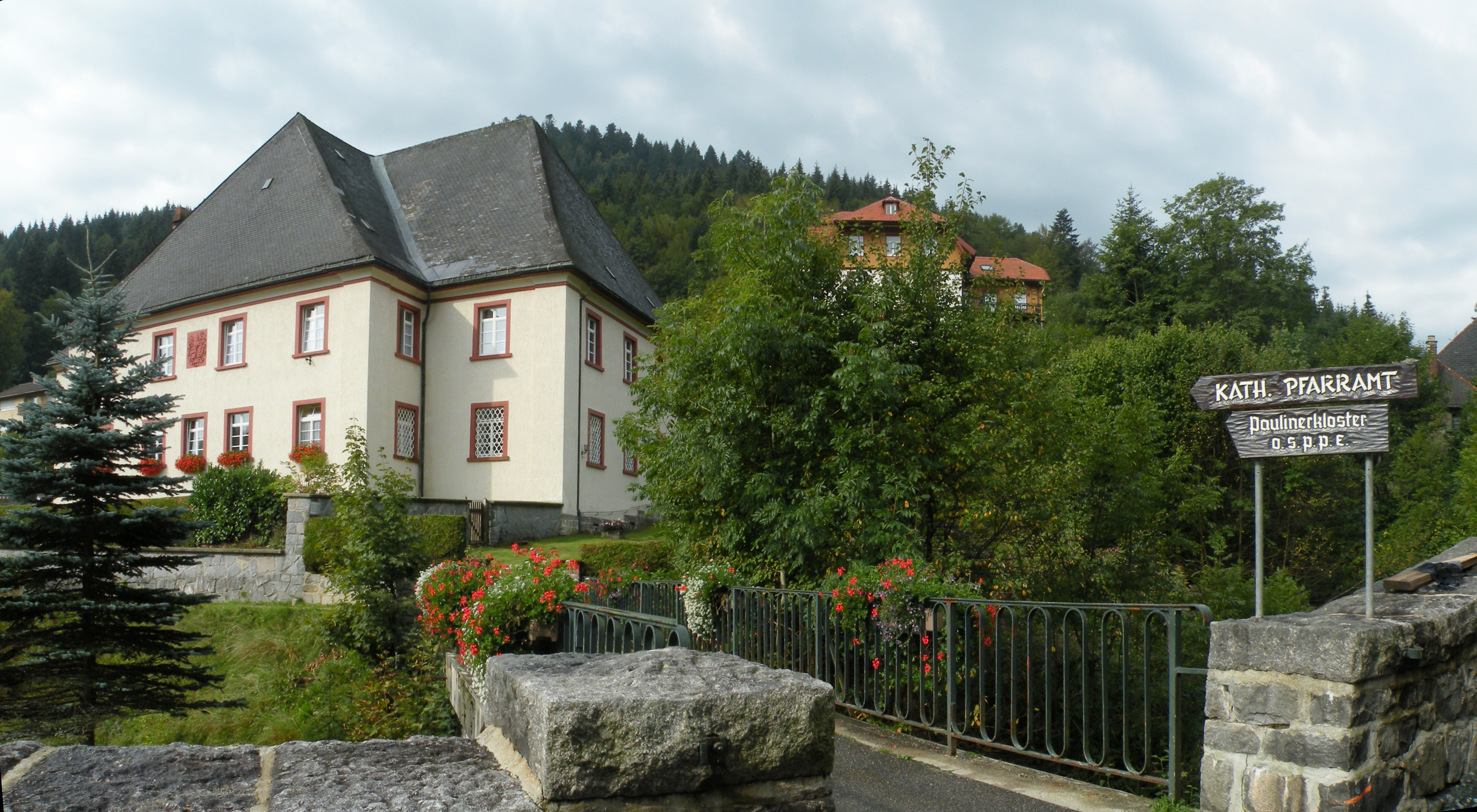 Klooster in Todtmoos, Zwarte Woud